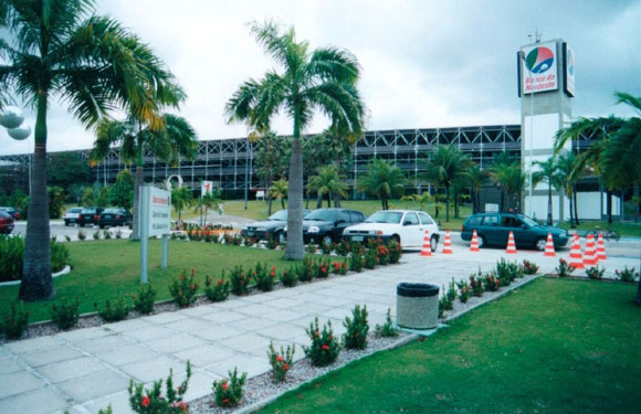 Centro de Treinamento do Banco do Nordeste em Fortaleza, CE - Brazil